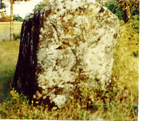 Stecak u Vuletica greblju